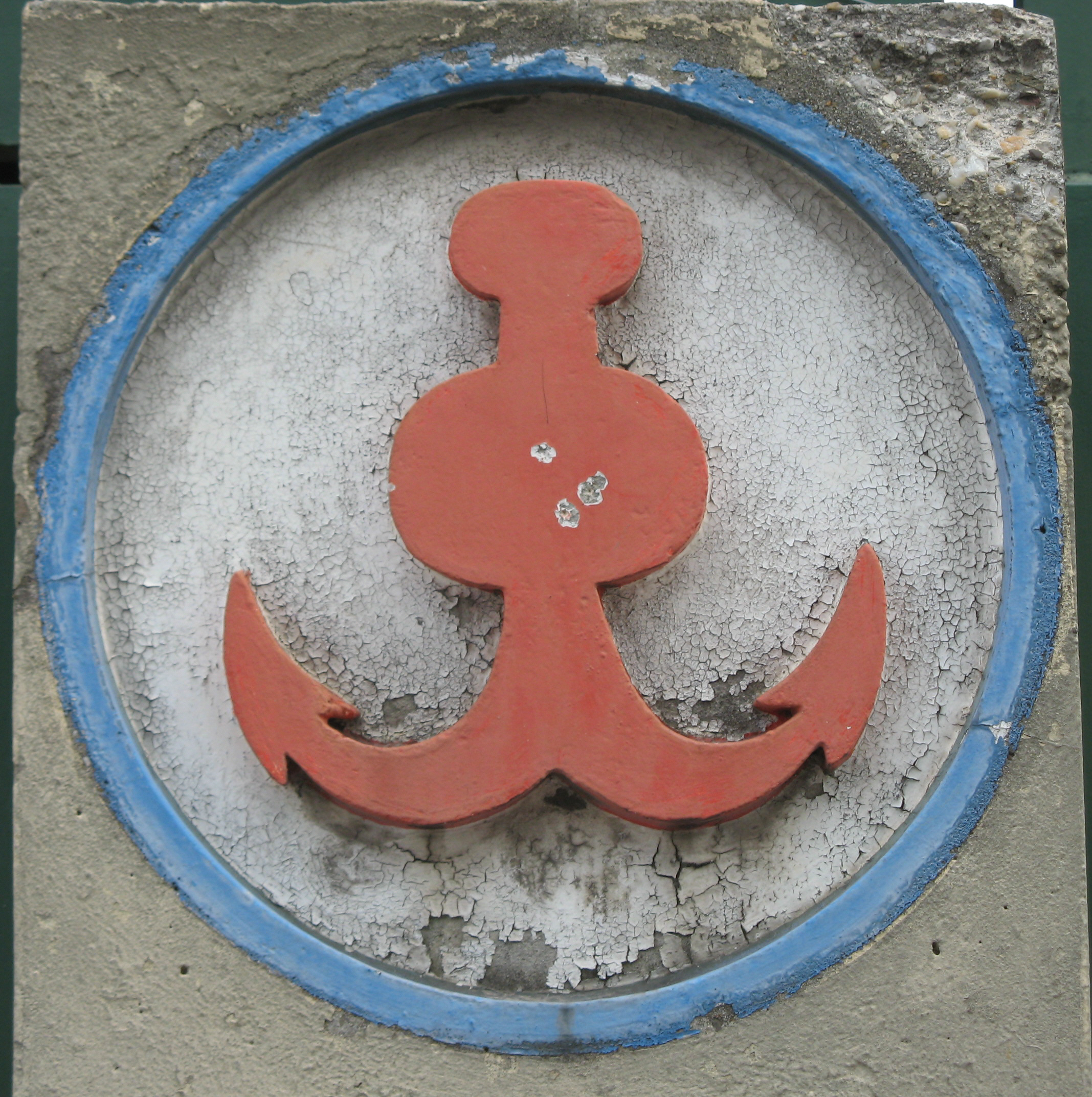 Ehemaliges Signet der Firma Ankerbrot auf der Ankerbrot-Fabrik, Absberggasse 35, Wien-Favoriten